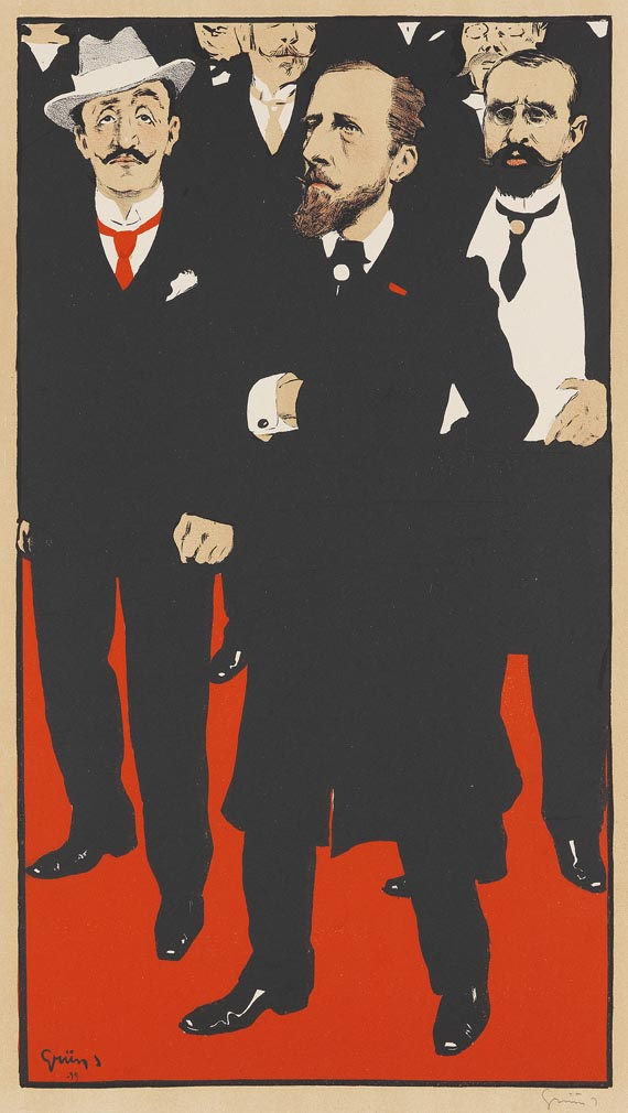 Plakat (Farblithographie), 42,5 x 22,5 cm